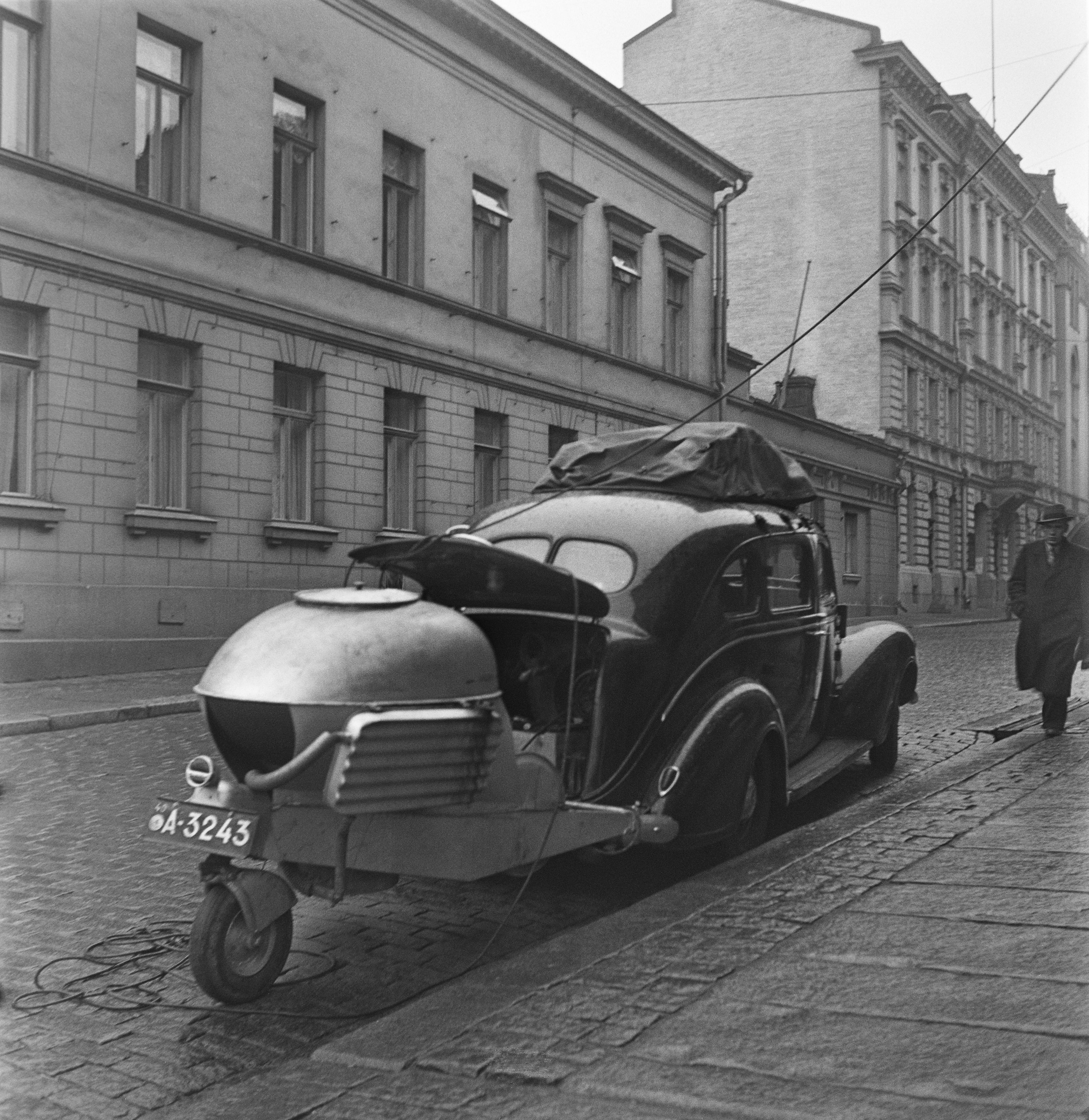 Yleisradion ääniauto (häkäpönttöauto, puuhiilellä käyvä katsausauto) pysäköitynä kadulle. Kuvausaika arvioitu vuosikymmenen tarkkuudella. Tiedätkö jotain tästä kuvasta? Jätä kommentti tai ota yhteyttä sähköpostitse: Tutustu Ylen arkistosisältöihin: Fler skatter från Yles arkiv: More about Yle, the Finnish Broadcasting Company